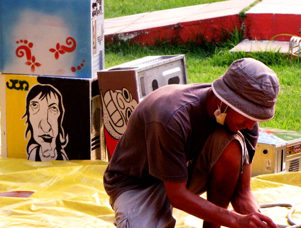 Encontrão Metareciclagem no Bailux: Paulo pintando visões do futuro metareciclado